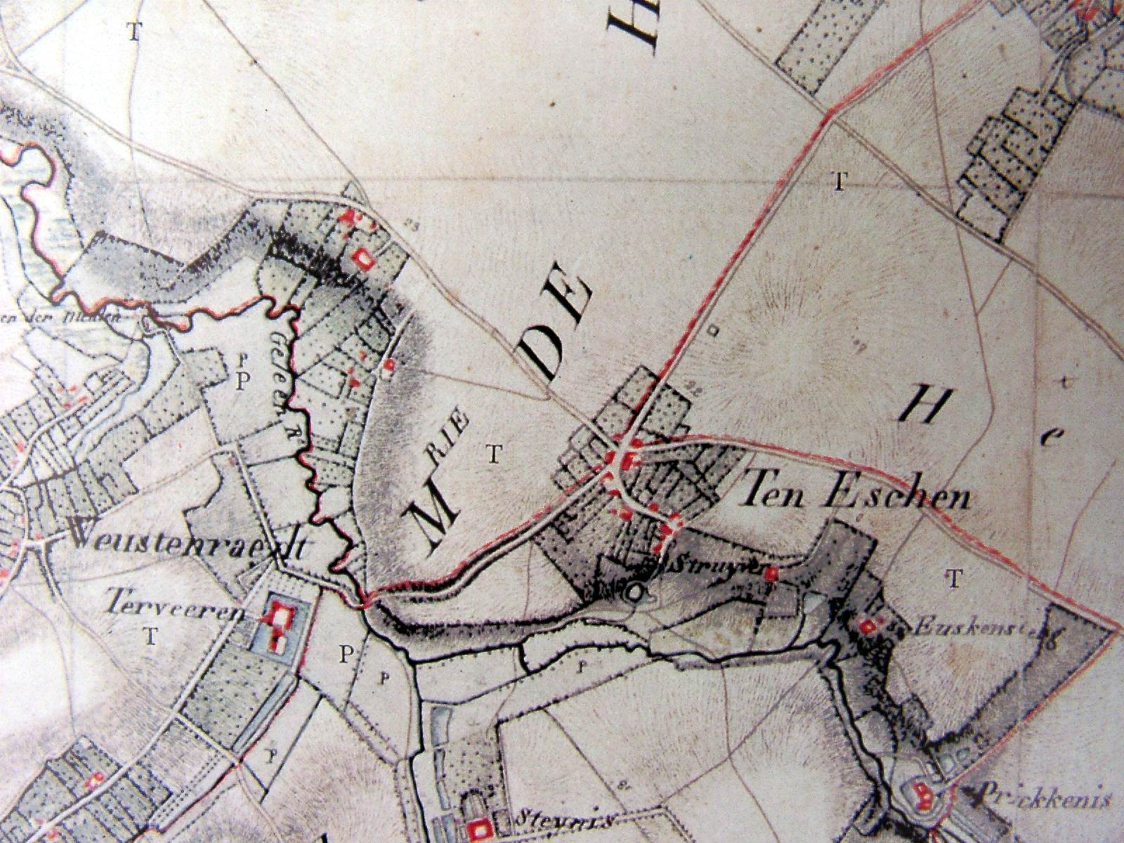 eigen scan Tranchot kaart 1803 1807 Ten Esschen